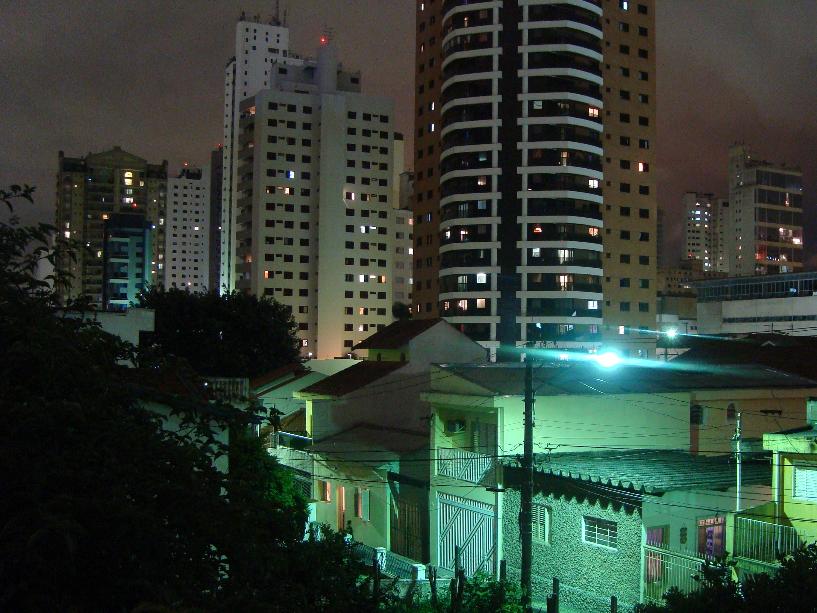 Alto de Santana região da cidade de São Paulo.